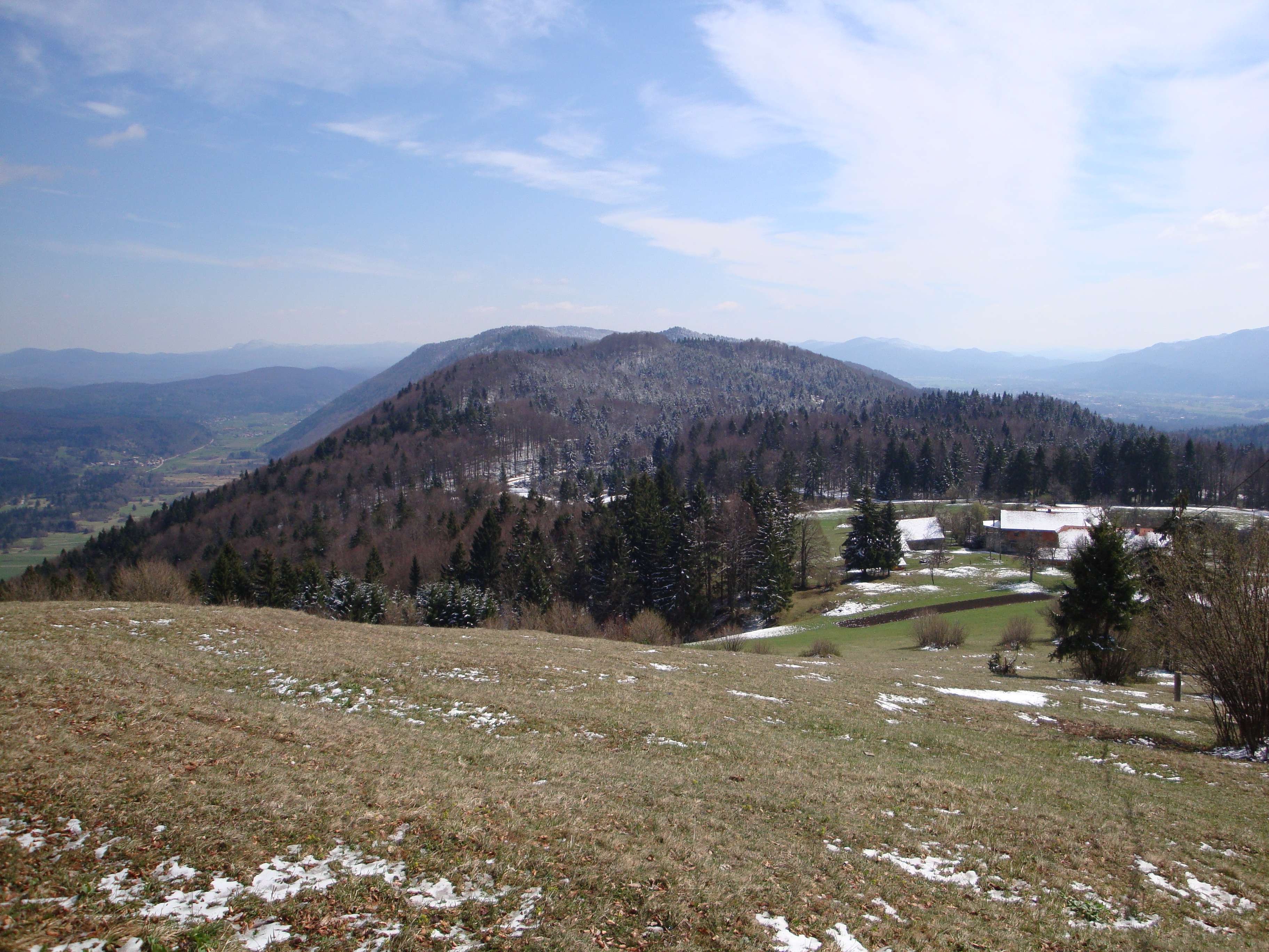 Pogled od doma na Grmadi po Mali gori